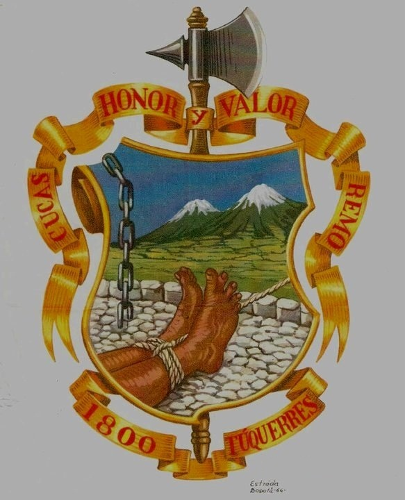 Escudo de Túquerres